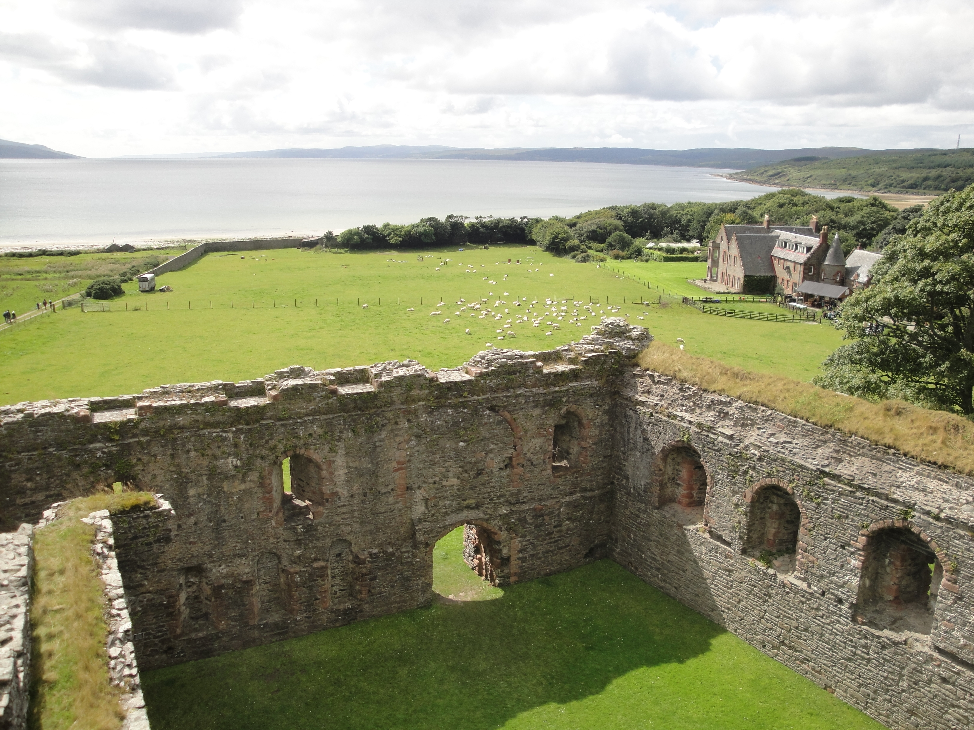 Château de Skipness